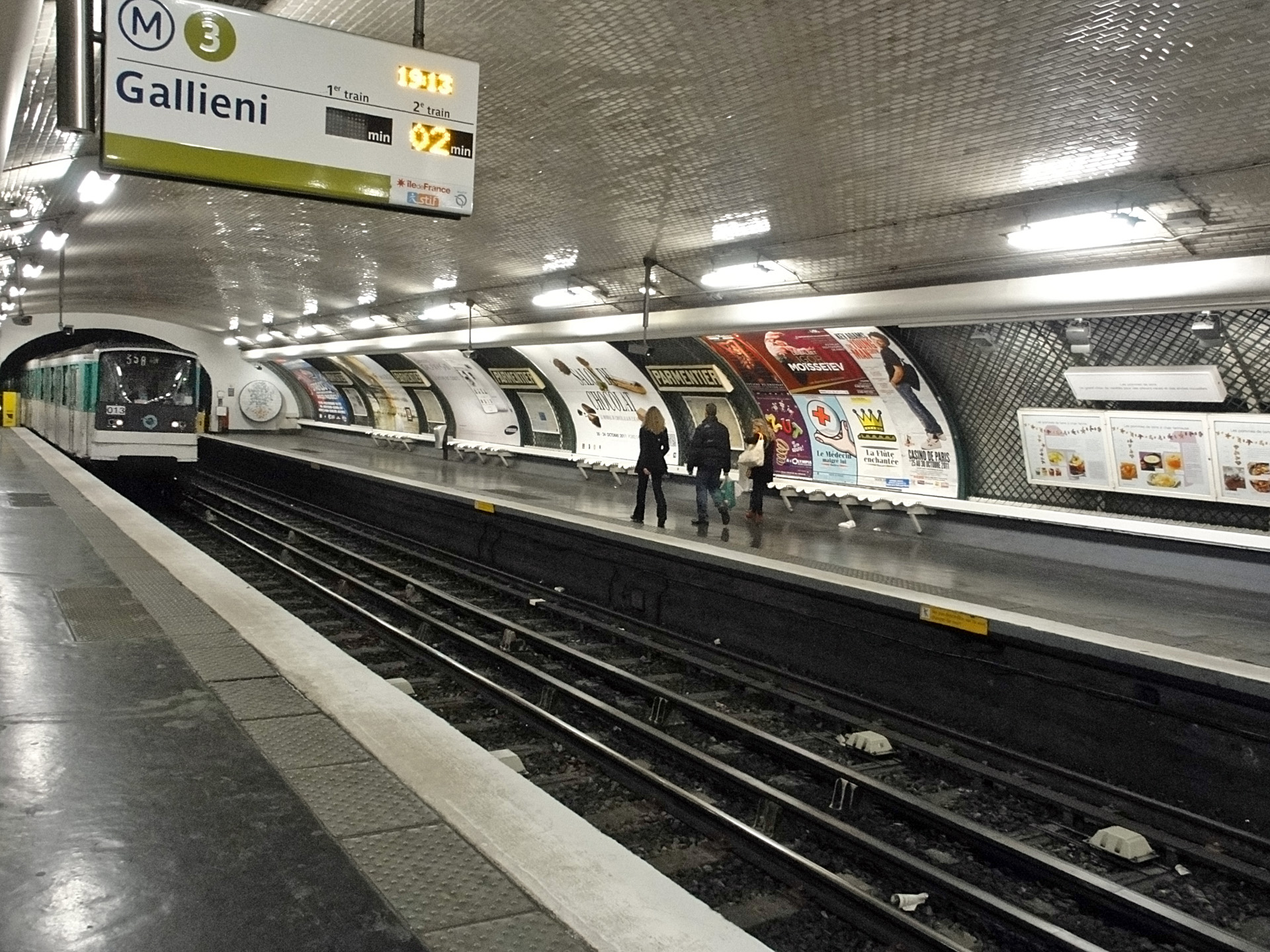 Station Parmentier de la ligne 3 du métro de Paris, France.